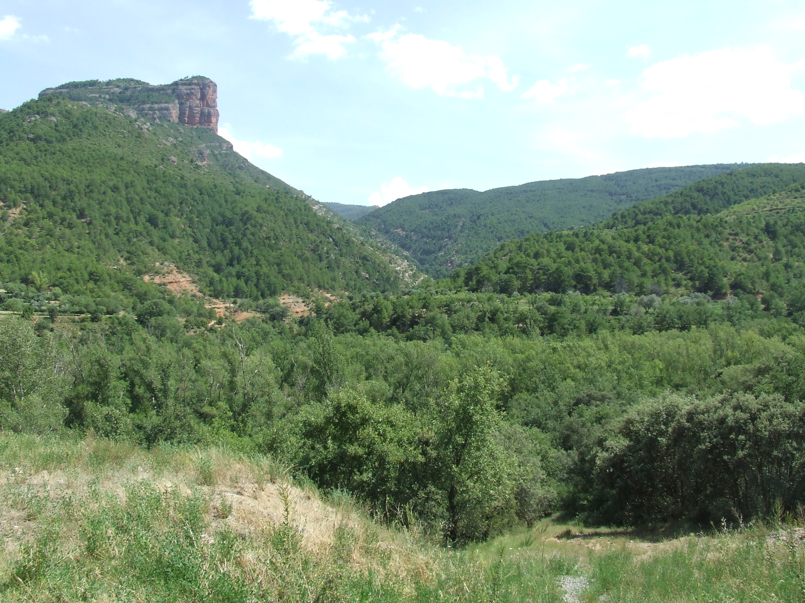 Vall del barranc de Santa (Hortoneda de la Conca, Conca de Dalt, Pallars Jussà)